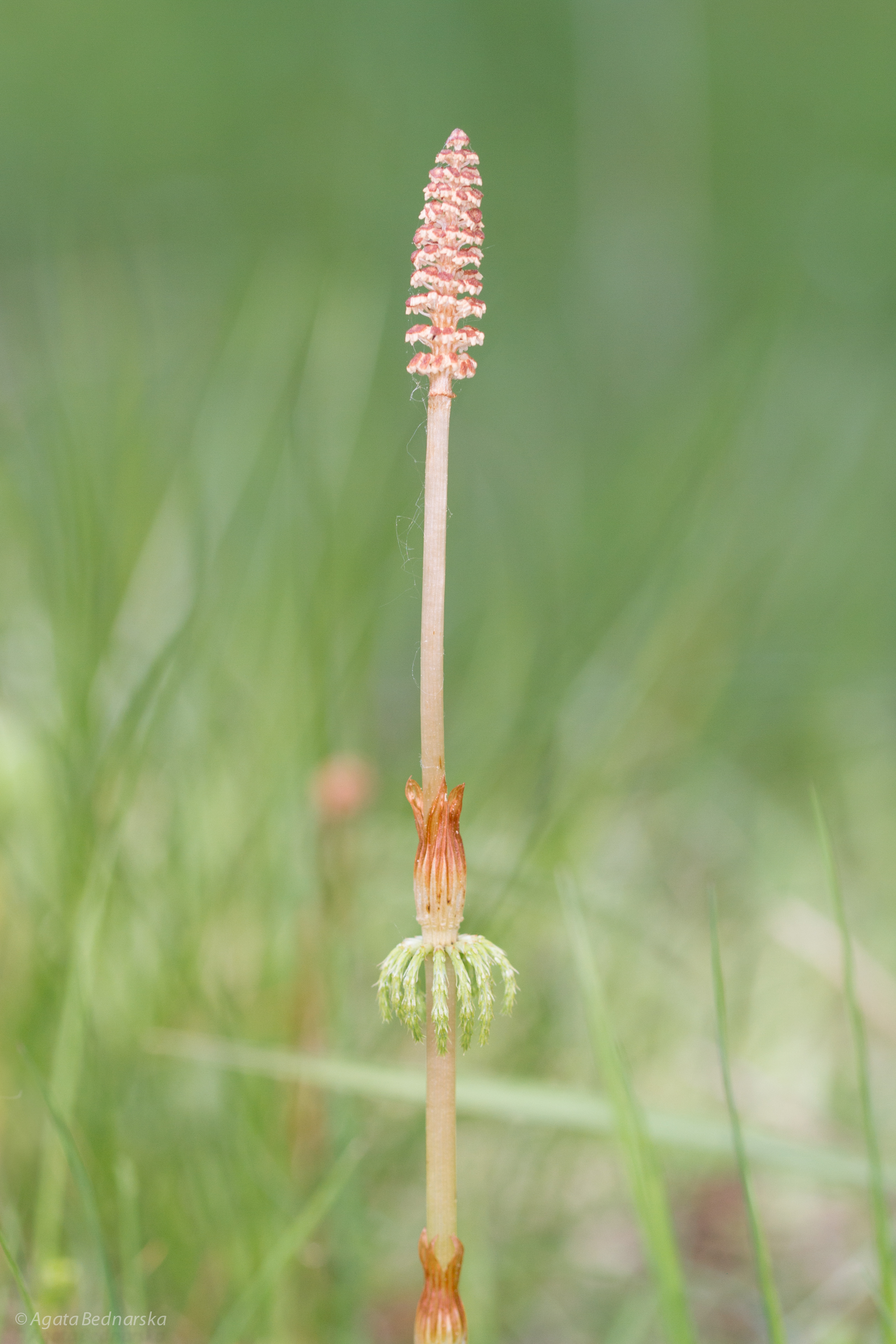 Gorczański Park Narodowy